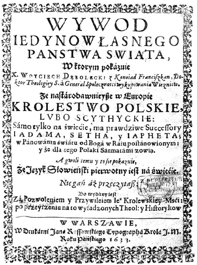 Wojciech Dębołęcki. "Wywód jedynowłasnego państwa świata" . Warszawа, 1633.